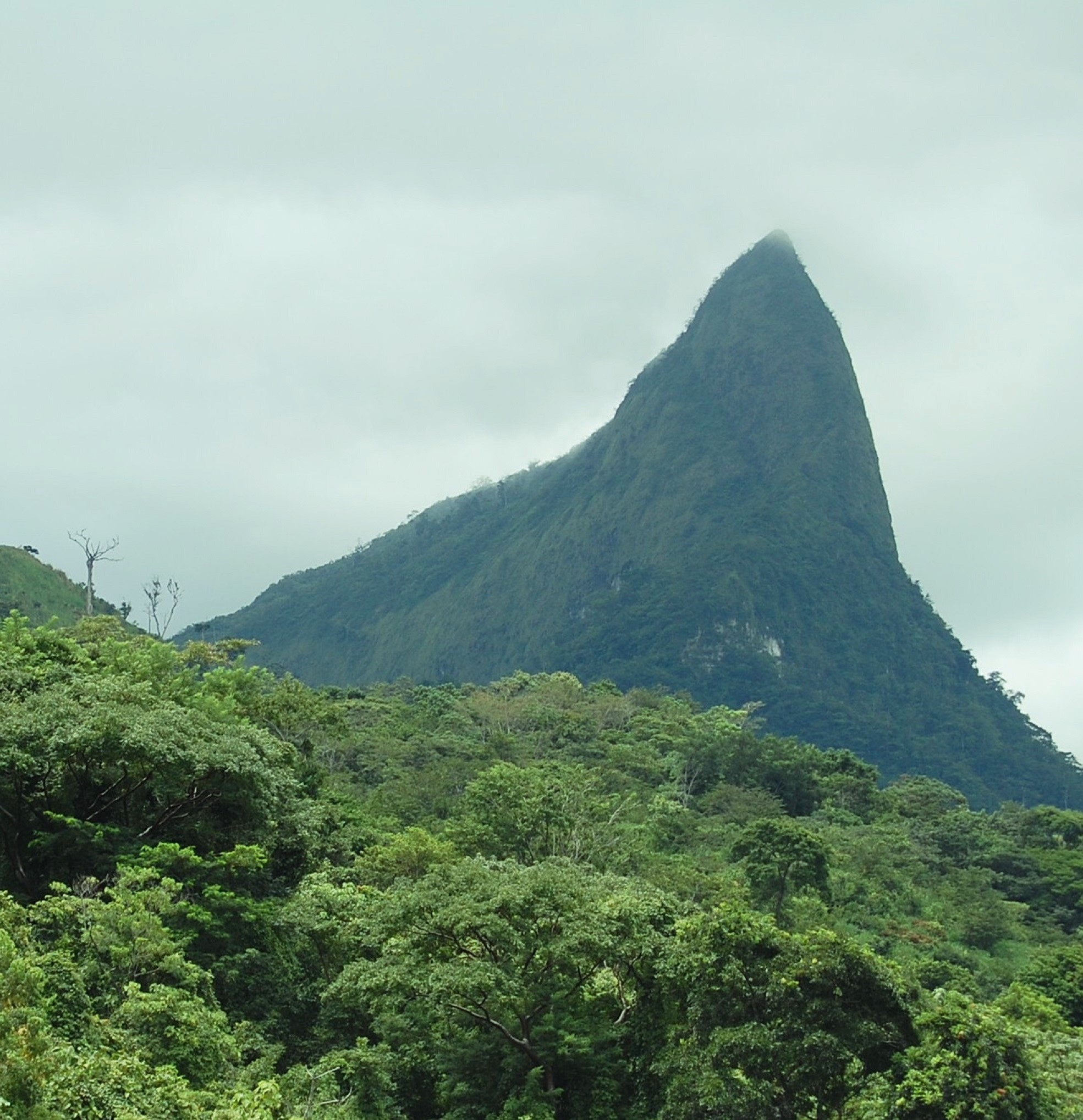 Cerro Mono Pelado, localizado en el municipio de Huimanguillo, estado de Tabasco, México. Posee una altura de 1,000 msnm siendo el cerro más alto de Tabasco